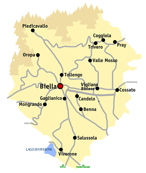 Kaart van de provincie Biella